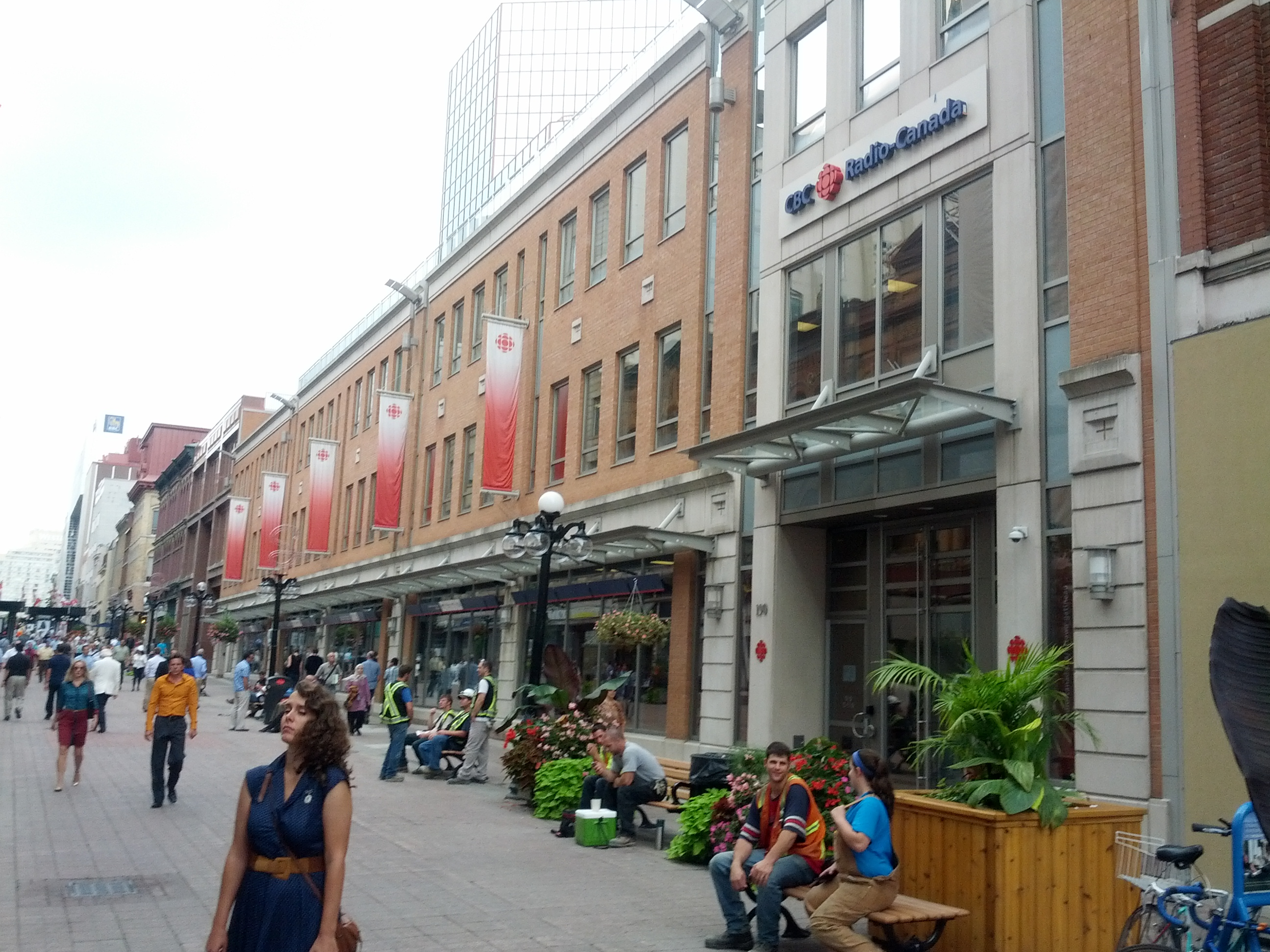 Rua em Ottawa.